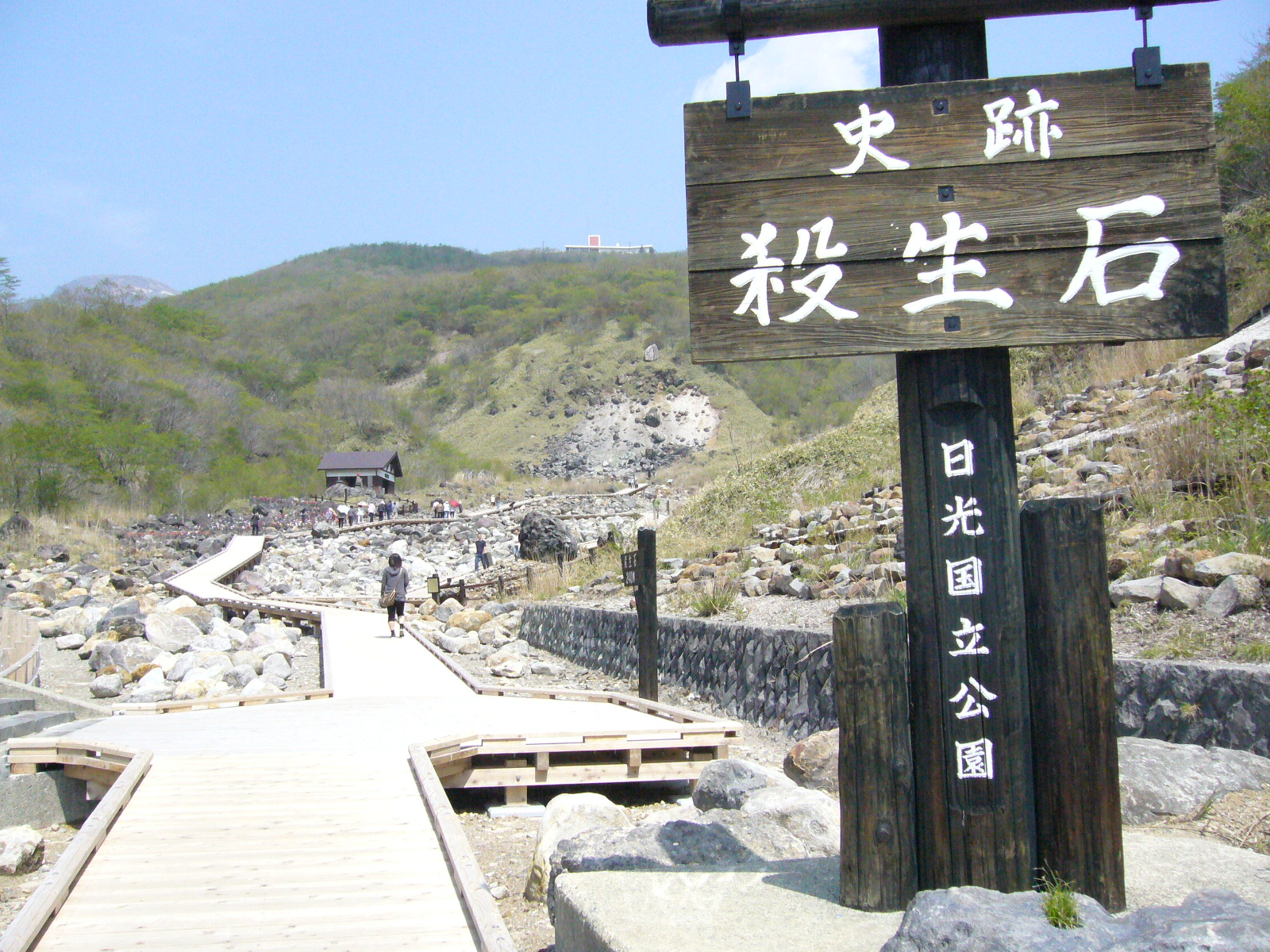 sassyouseki,nasu-town,japan.JPG